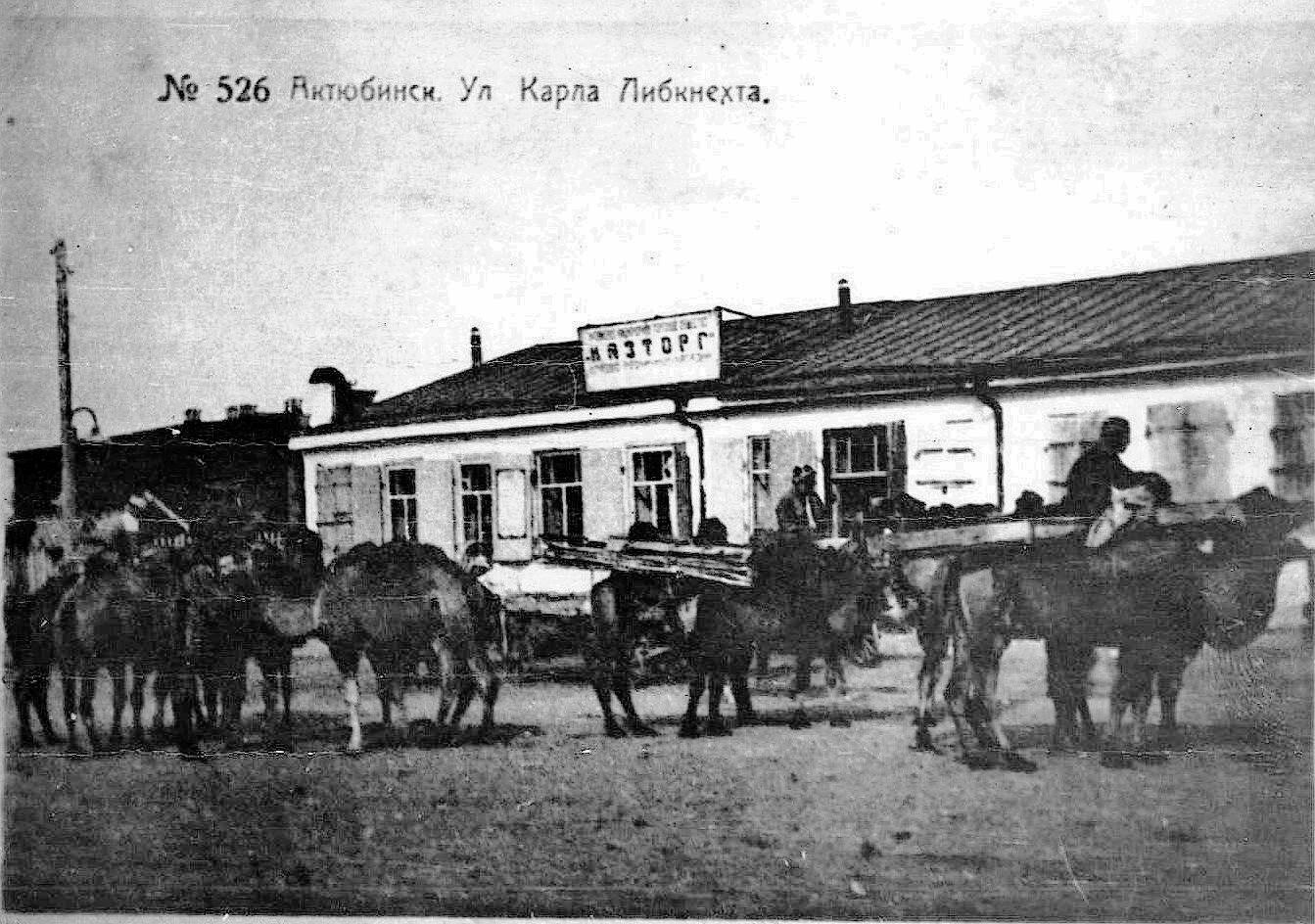 30-е годы ул.К.Либкнехта